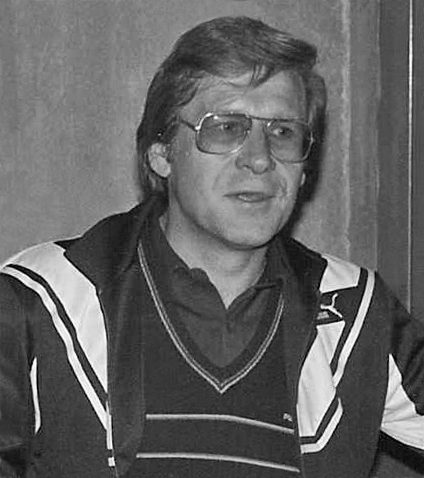 Diethelm Ferner als Trainer des FC Schalke 04, 1985